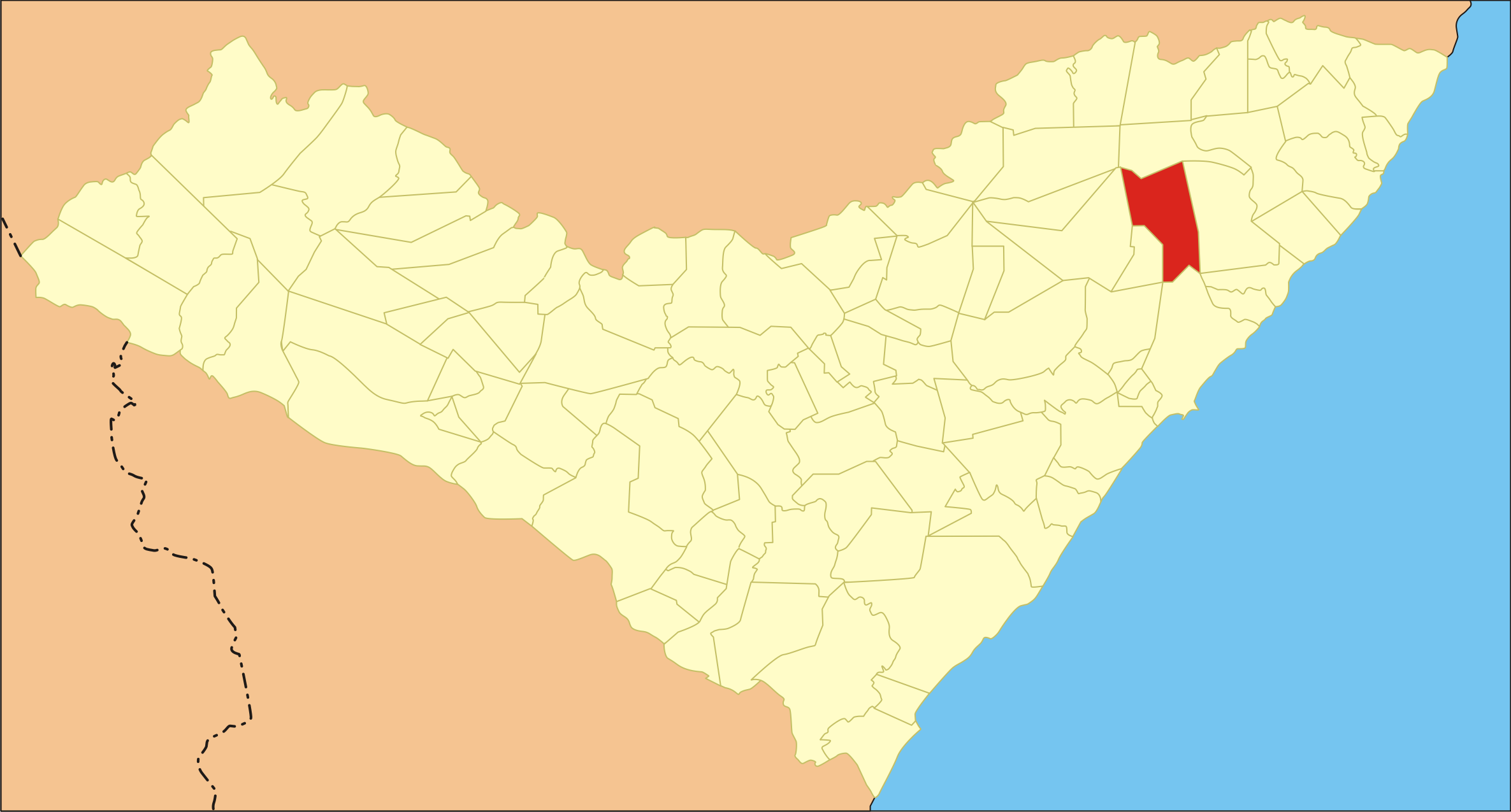 Localização da cidade em Alagoas